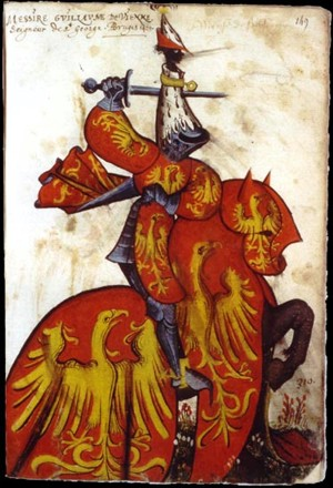 Armorial équestre de la Toison d'or, Flandre, Knight - Guillame de Vienne